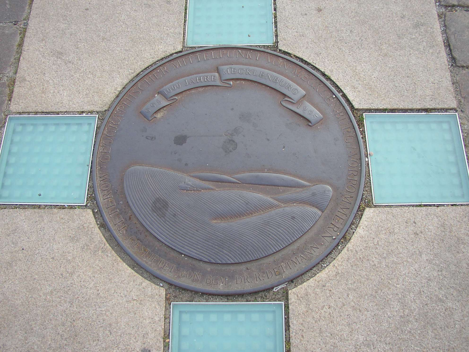 „Geographischer Mittelpunkt von Mecklenburg-Vorpommern“ auf dem Teterower Marktplatz in Mecklenburg-Vorpommern, Deutschland